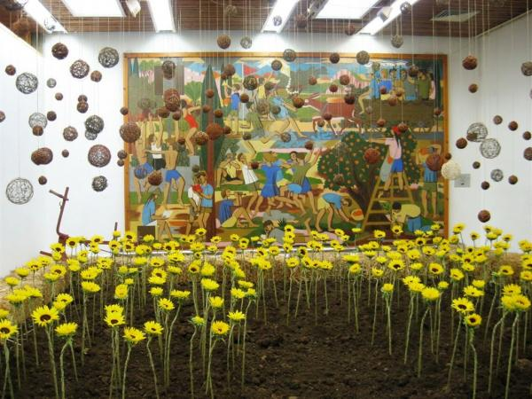 ן-שמואל-חג ביכורים 2008-קשוט הכניסה לחדר האוכל